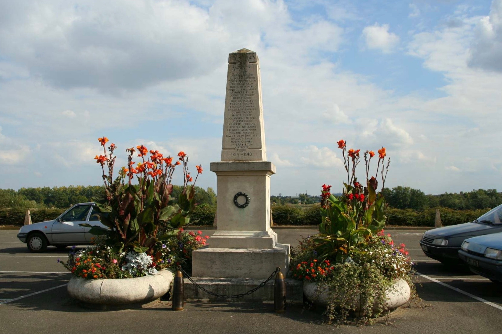 Monument aux morts du Mesnil-le-Roi - Yvelines (France)